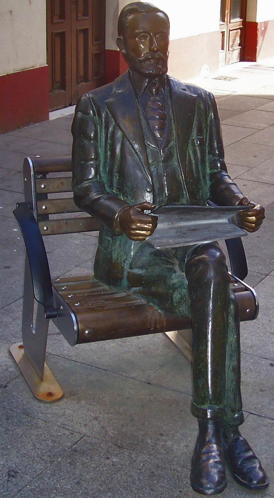 Carballo, estatua a Alfredo Brañas, inaugurada en febrero de 2005, obra de César Lombera.